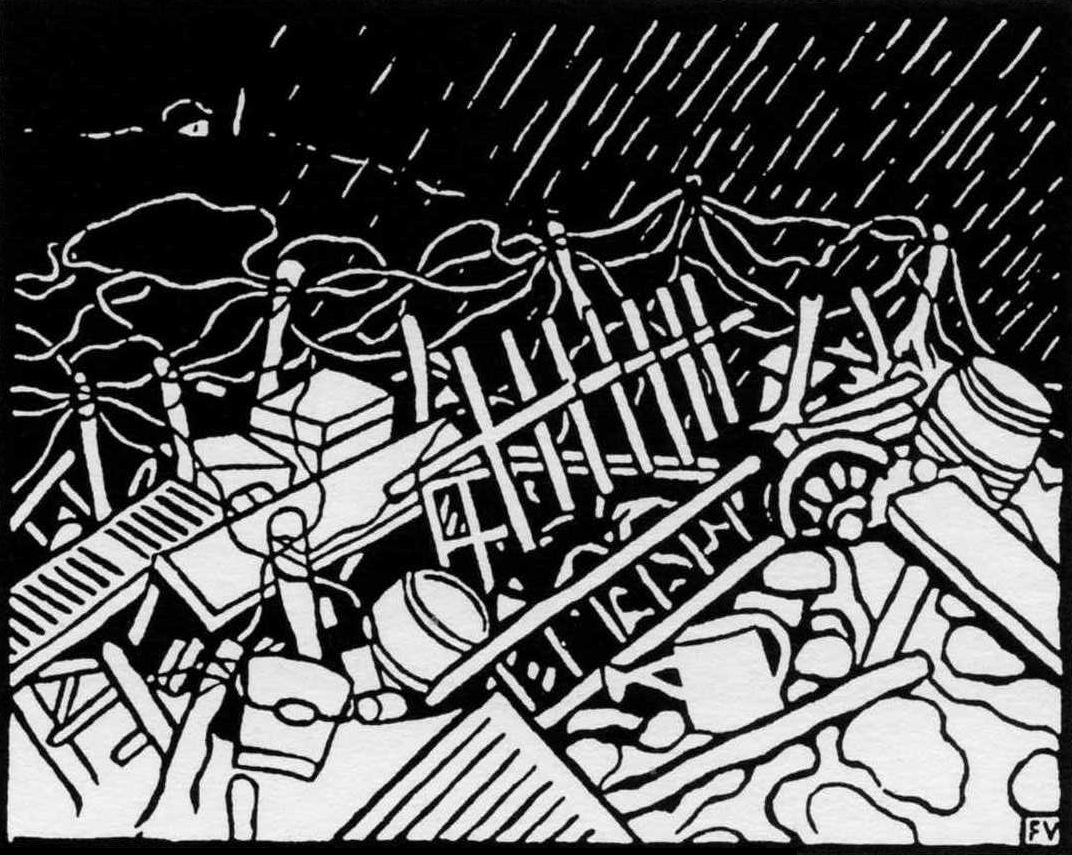 Félix Vallotton - Le guetteur 1916